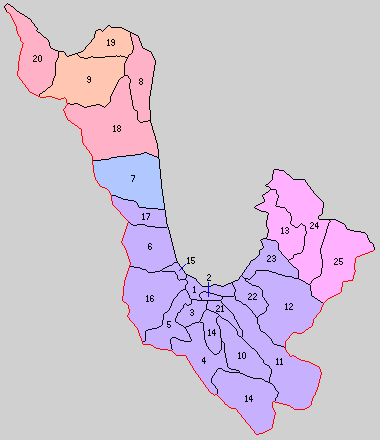 青森県東津軽郡の町村。